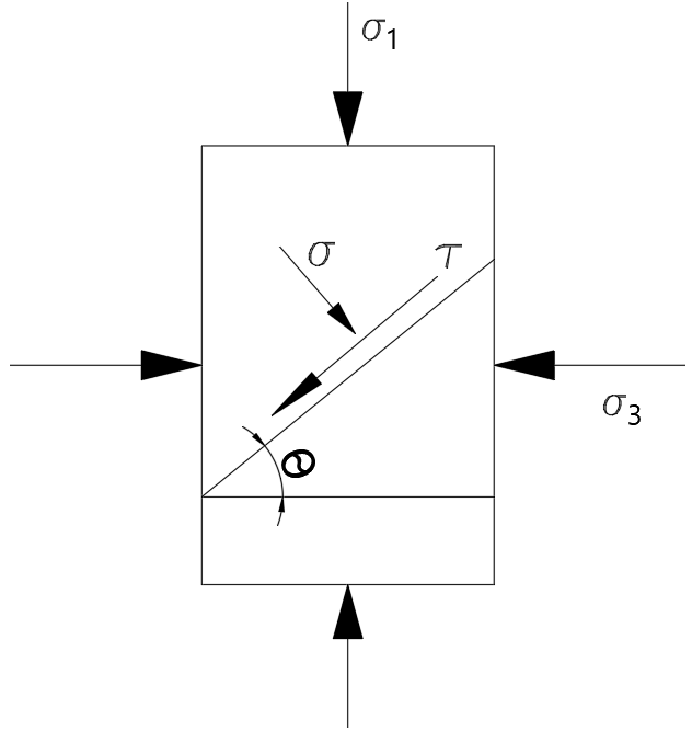 미소 요소의 전단응력